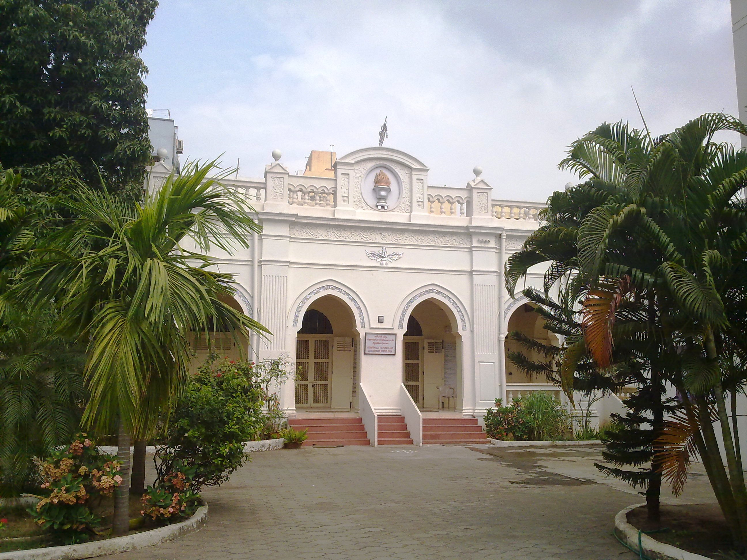 PARSI TEMPLE @ FIRE TEMPLE, Dar-e-Meher